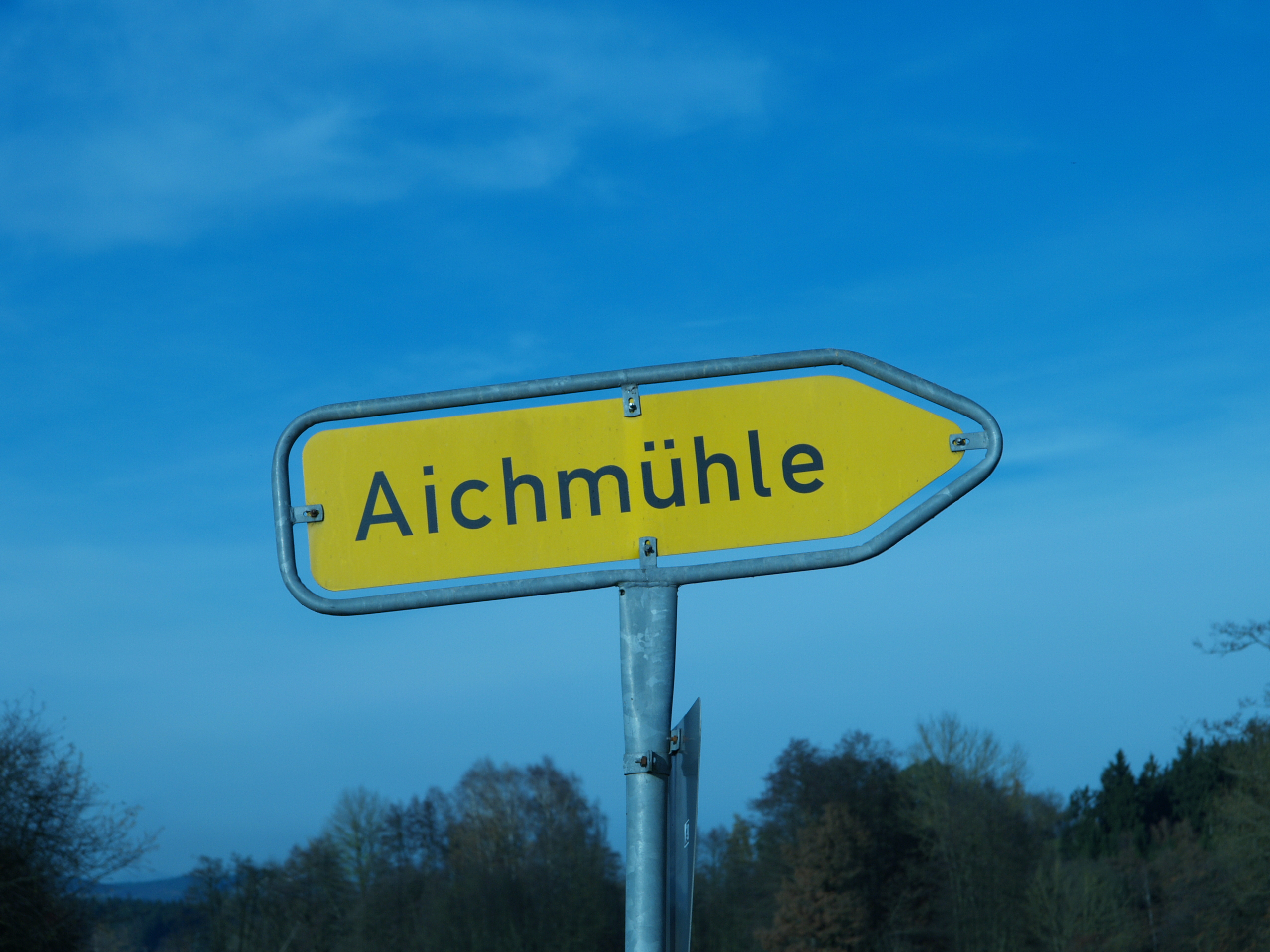 Wegweiser nach Aichmühl an der Abzweigung von der Straße Pellham-Wolferszell; der Ortsname ist falsch geschrieben: Aichmühl statt Aichmühle wäre korrekt; Zeichen 419-20